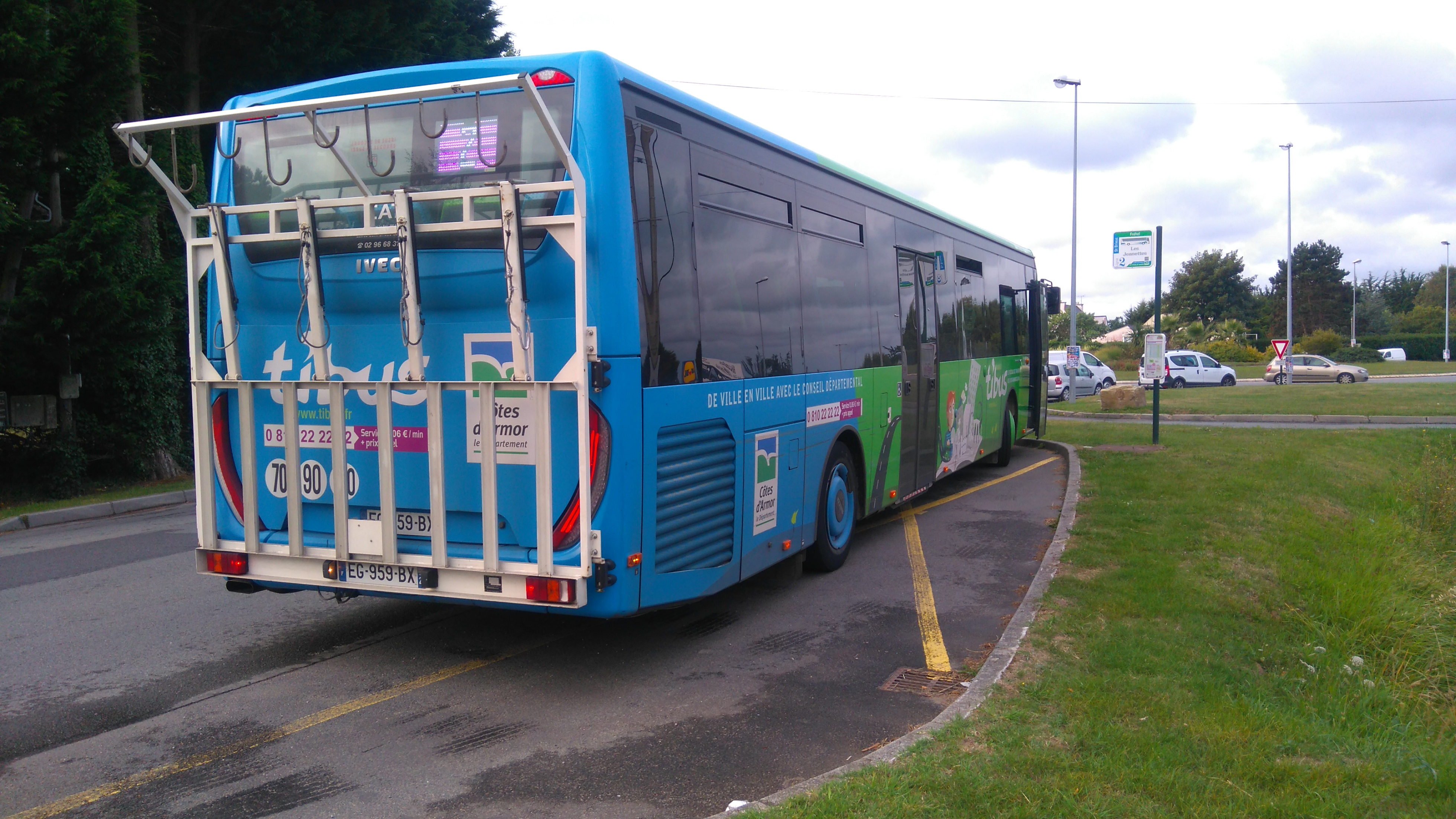 Bus Crossway LE Line 13 - Ti'Bus